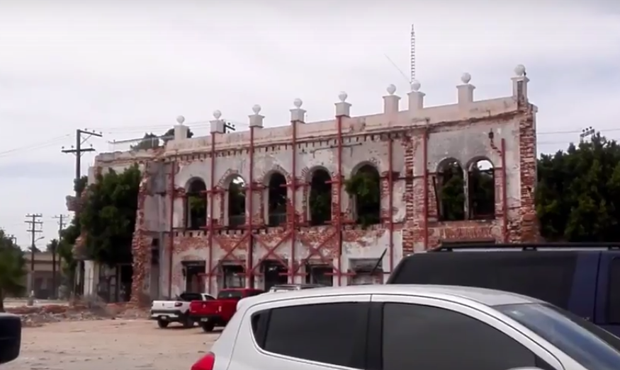 Muro de La Perla de La Paz